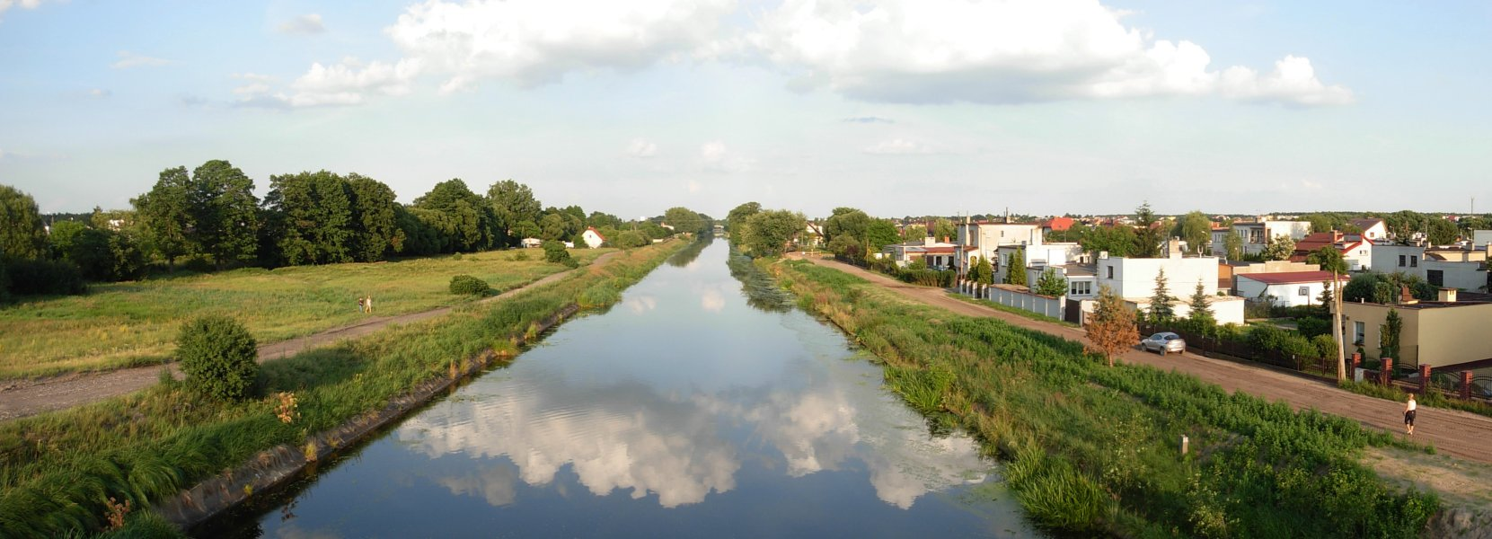 Kanał Bydgoski na Miedzyniu/Flisach w Bydgoszczy